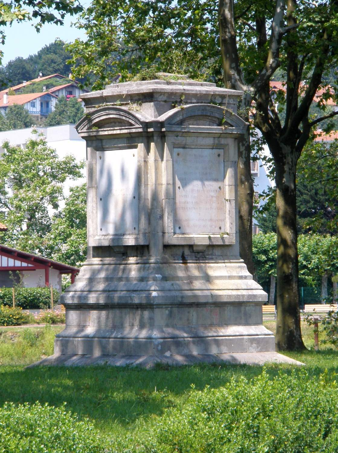 Isla de los Faisanes sobre el río Bisasoa, vista desde el lado español Irún). Memorial del Tratado de los Pirineos (1659)